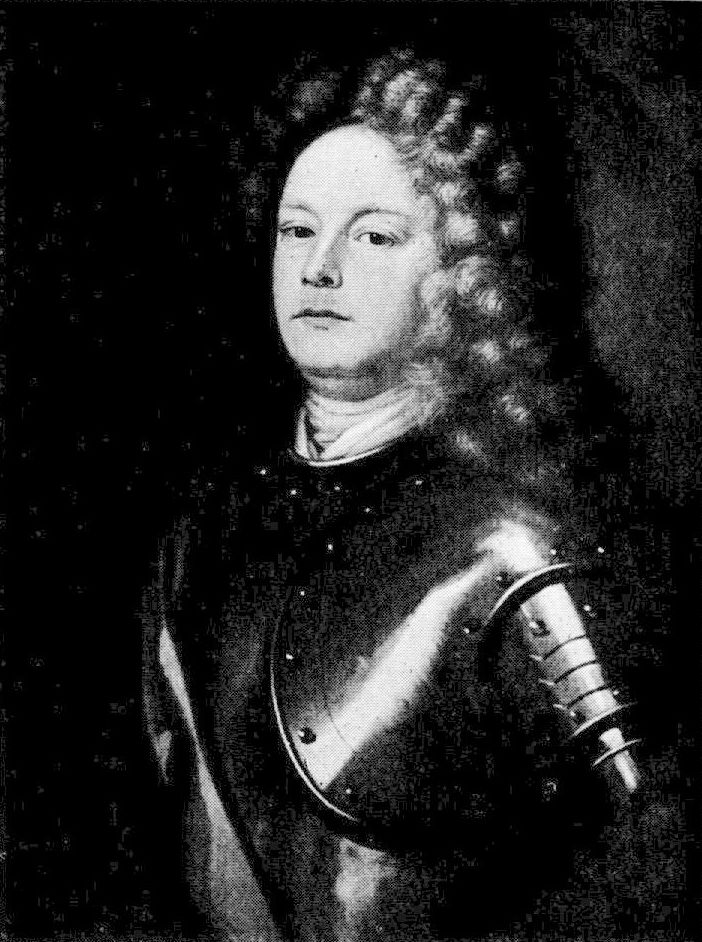 Swedish general, count and autobiographist Johan Adolf Clodt von Jürgensburg (1650-1720)